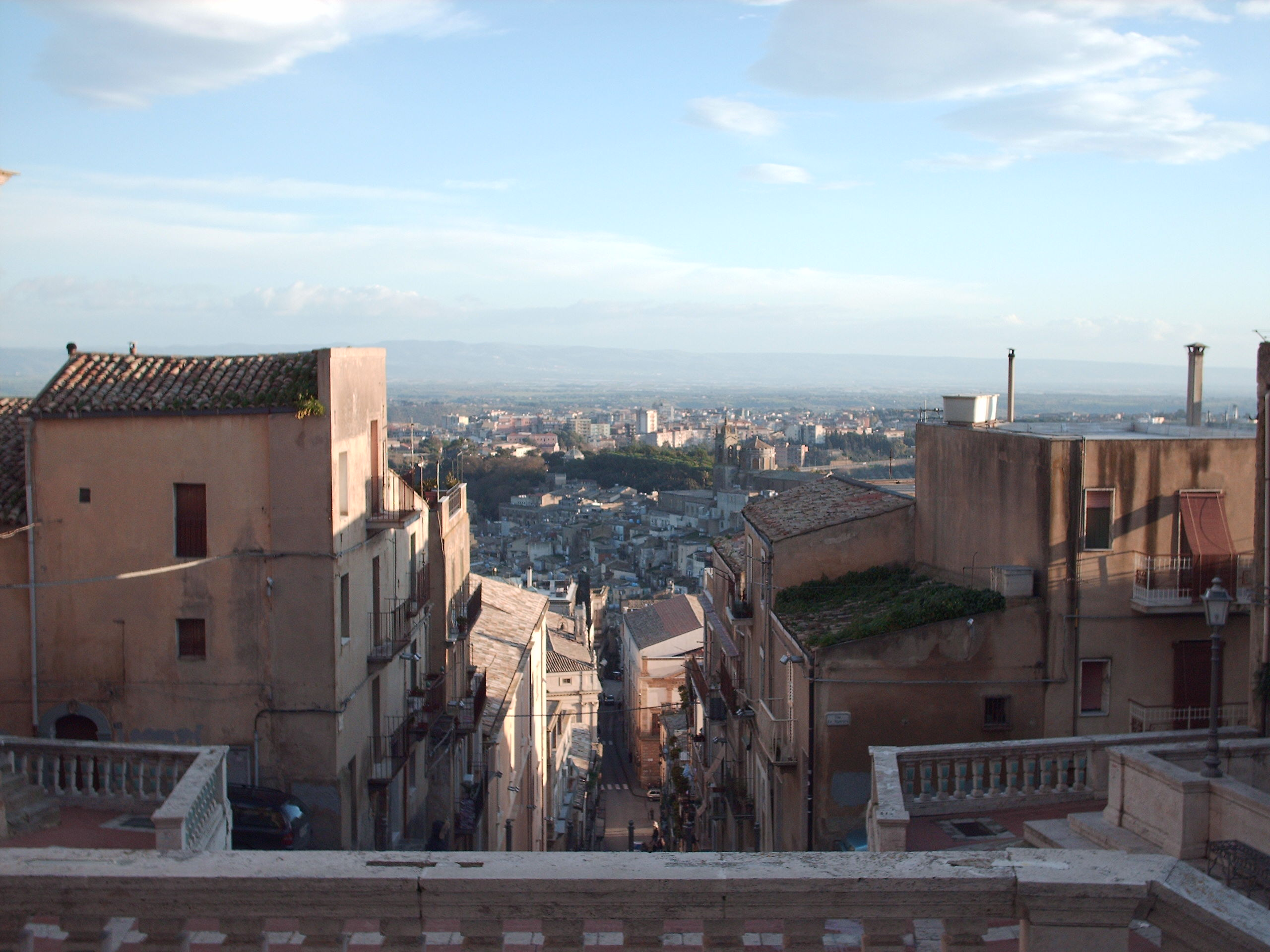 belvedere Santa Maria del Monte, belvedere Santa Maria del Monte